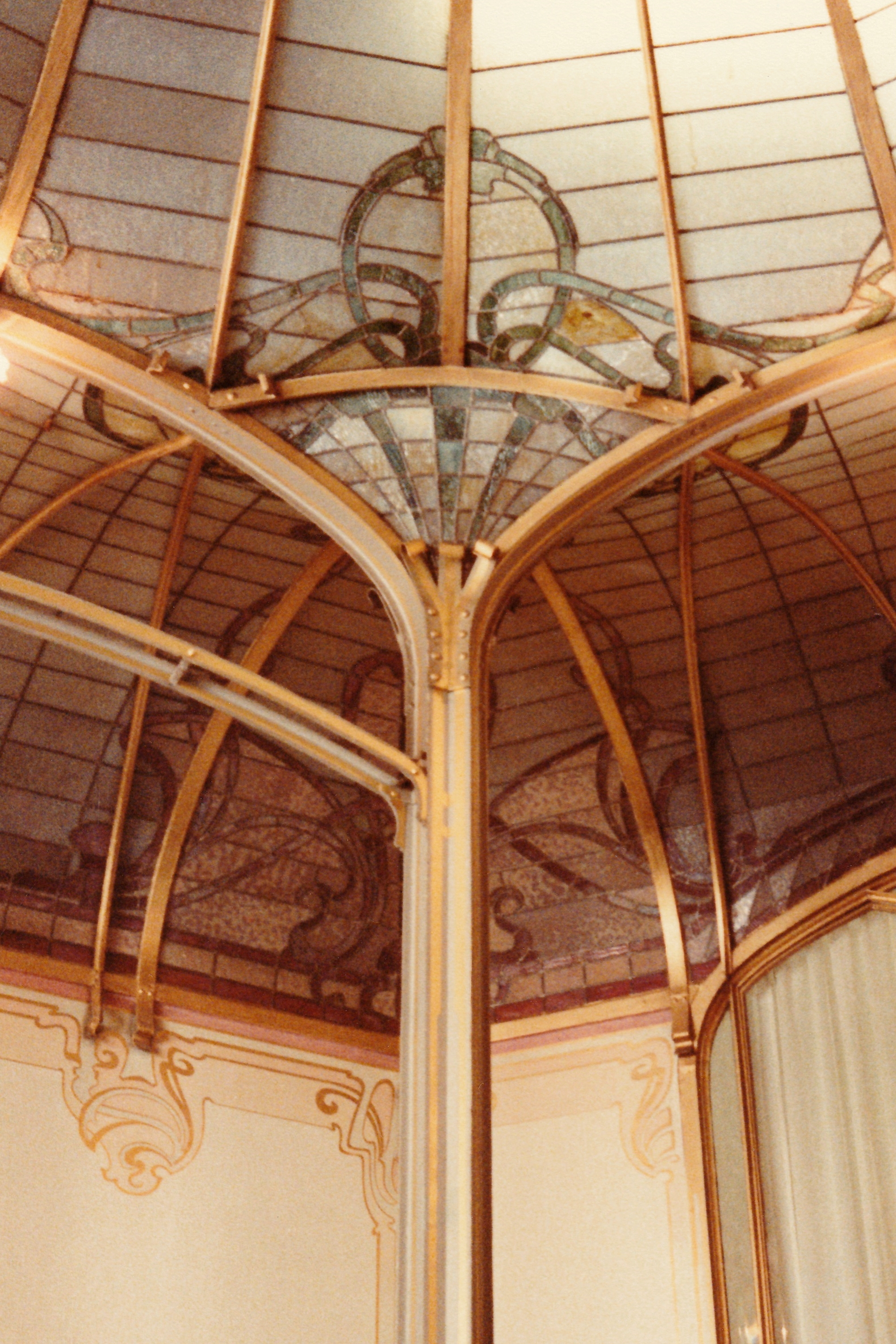 Belgique - Bruxelles - Hôtel Van Eetvelde (Art nouveau - Victor Horta - 1895)